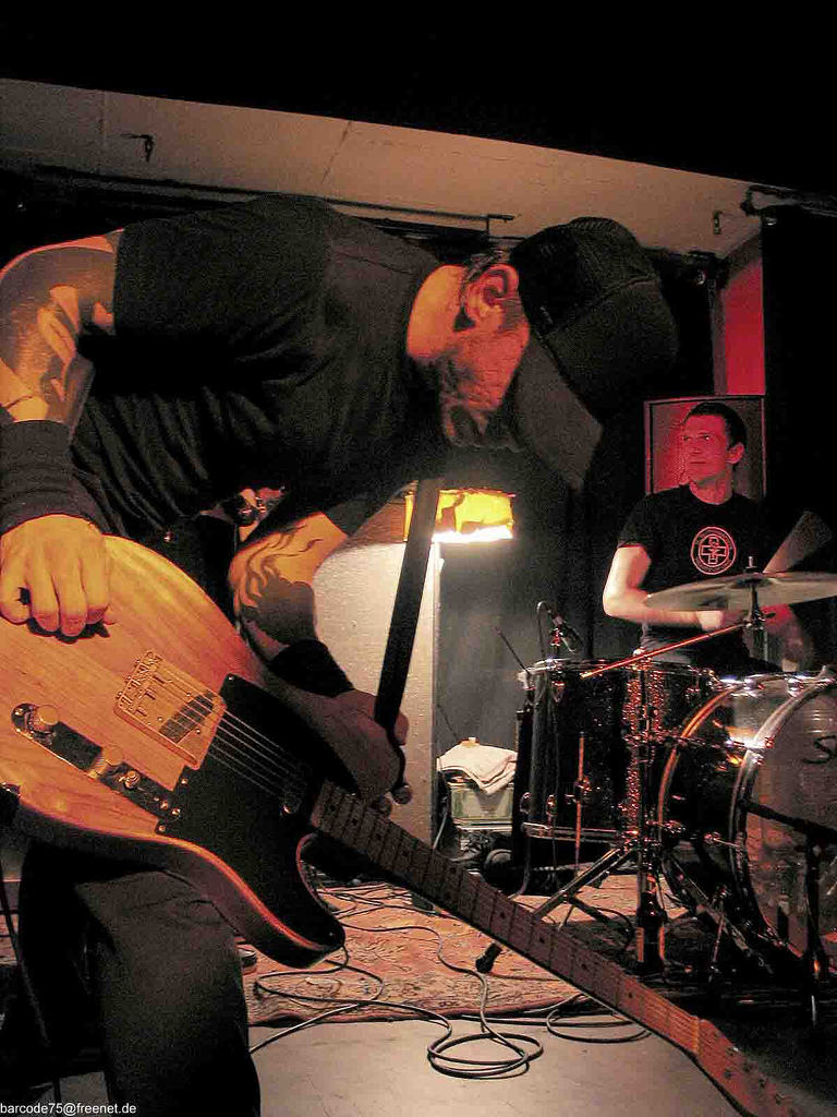 Turbostaat at Gleis 22, Münster